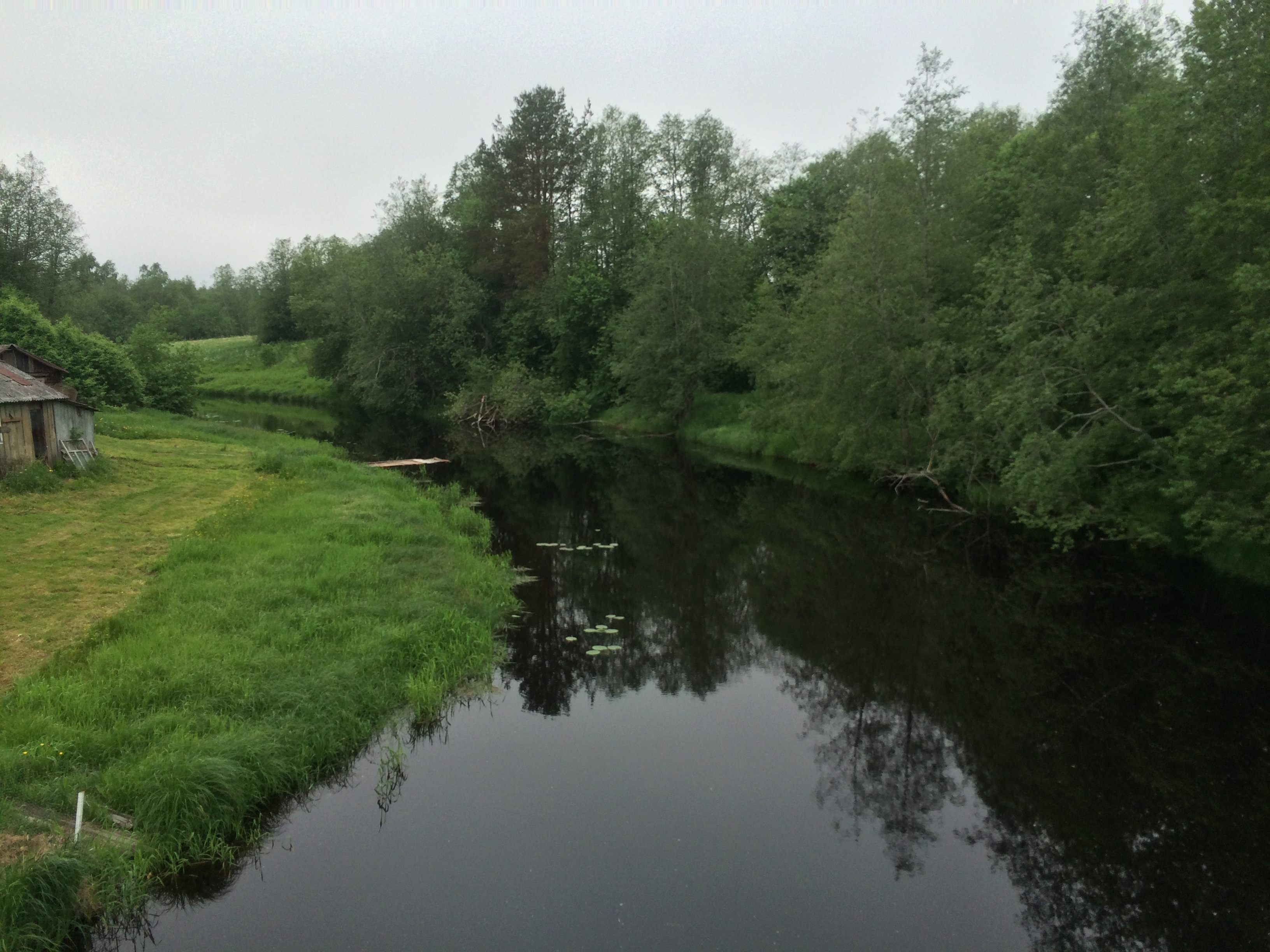 Новзема